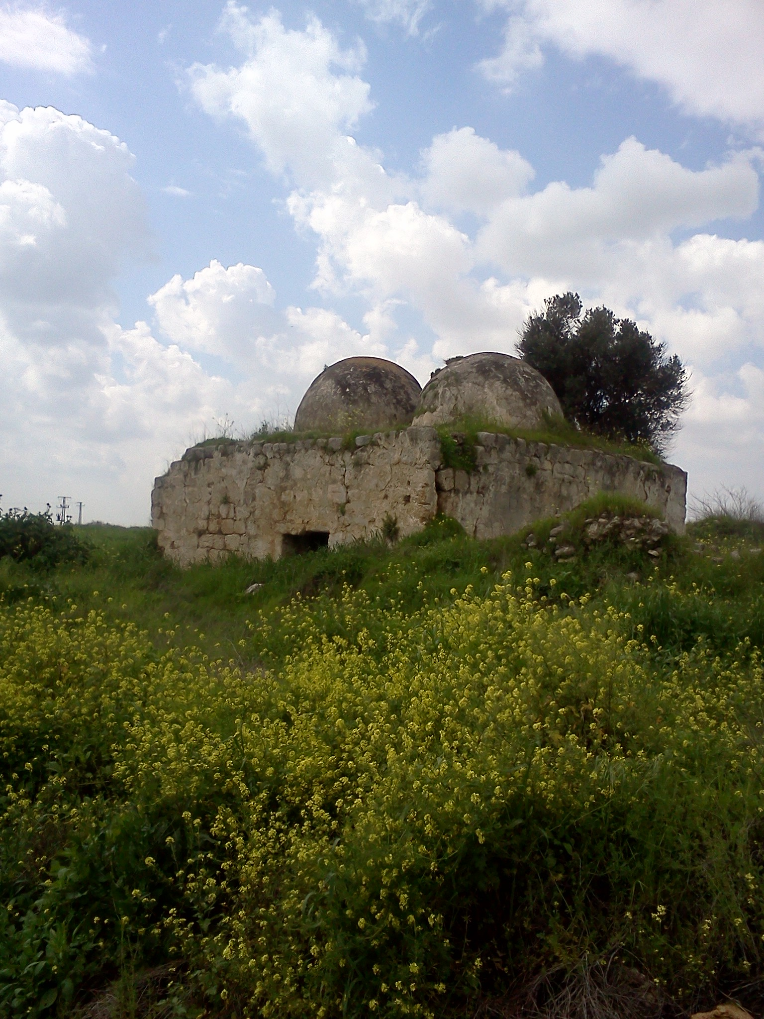 נחל ברקת נבי כיפל ליד טירת יהודה